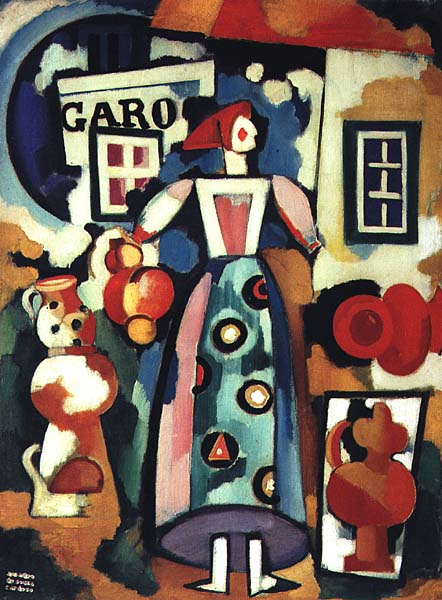 Canção Popular - a Russa e o Figarolabel QS:Lpt,"Canção Popular - a Russa e o Figaro"